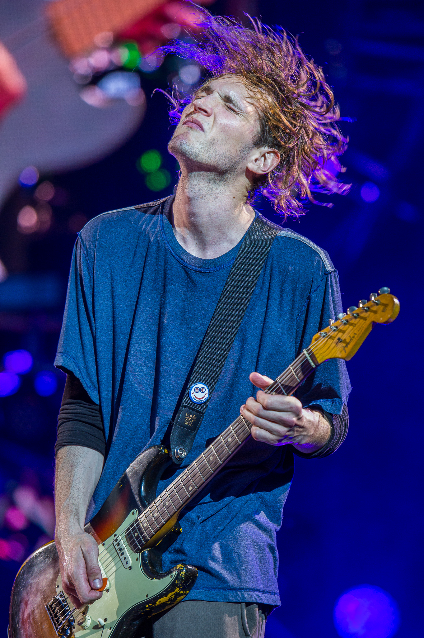 ARGO-Konzerte,Festival,Josh Klinghoffer,Konzert,Livekonzert,Livemusik,Musik,Red Hot Chili Peppers,RiP,Rock im Park 2016,Seat Zeppelin Stage